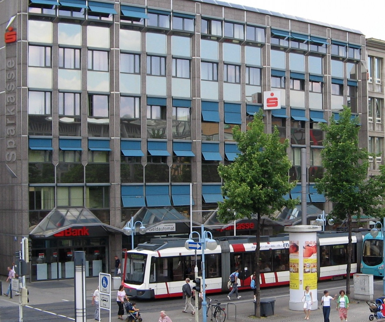 Sparkasse Rhein Neckar Nord am Mannheimer Paradeplatz im Juli 2006, aufgenommen von der Stadthausterasse (N1).